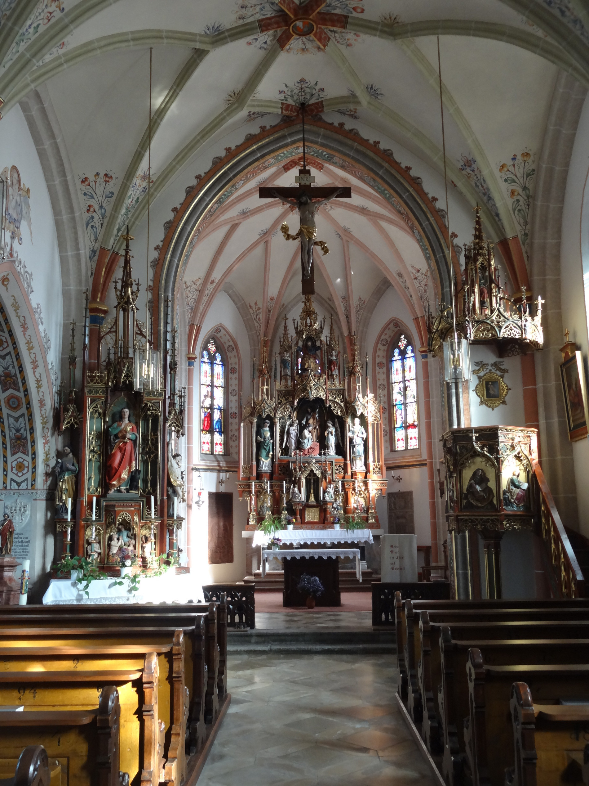 Innenansicht im Hauptschiff der Pfarrkirche St. Johann in Seyboldsdorf (Stadt Vilsbiburg, Lkr. Landshut)